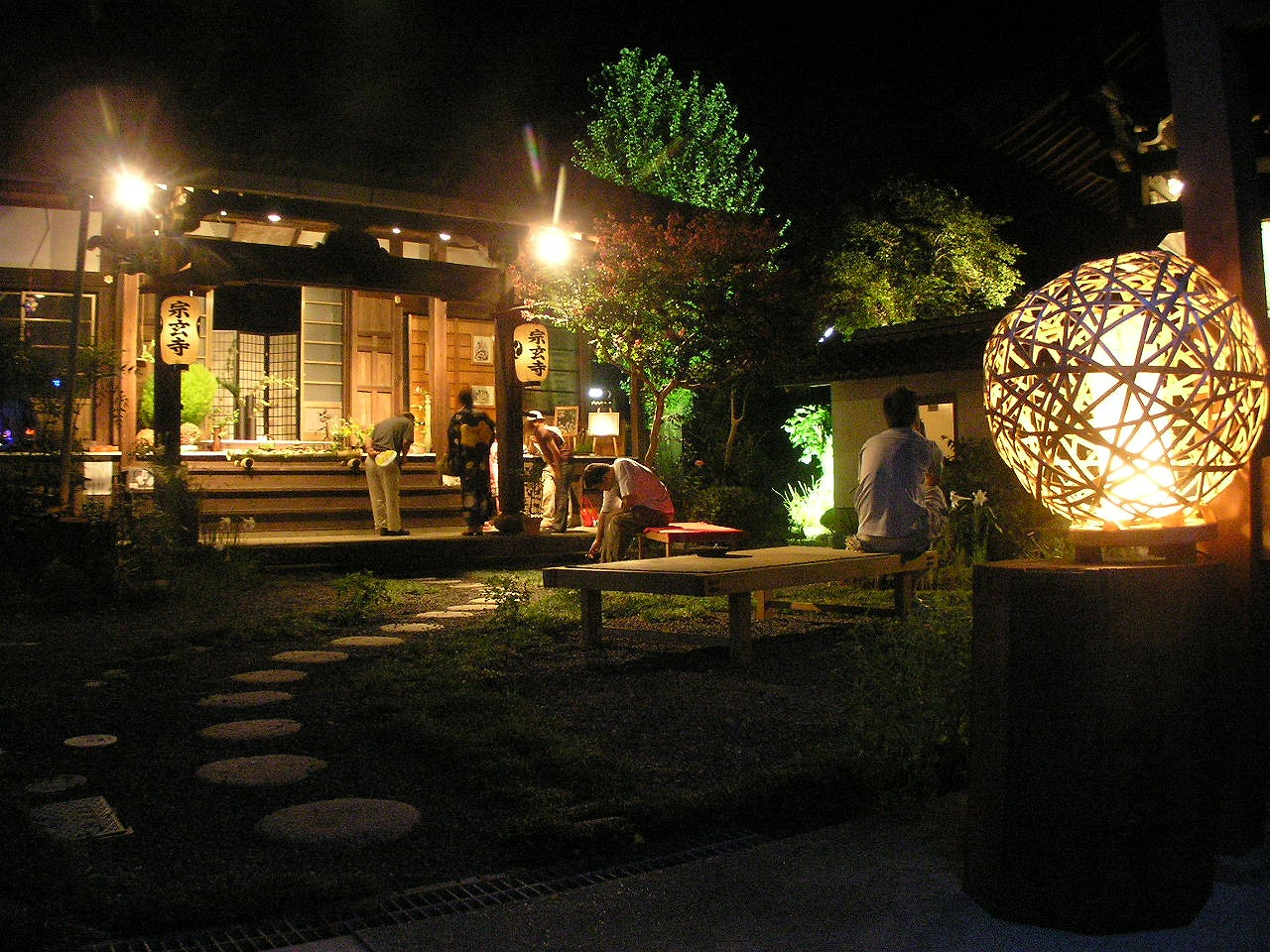 宗玄寺古市 sogen-temple